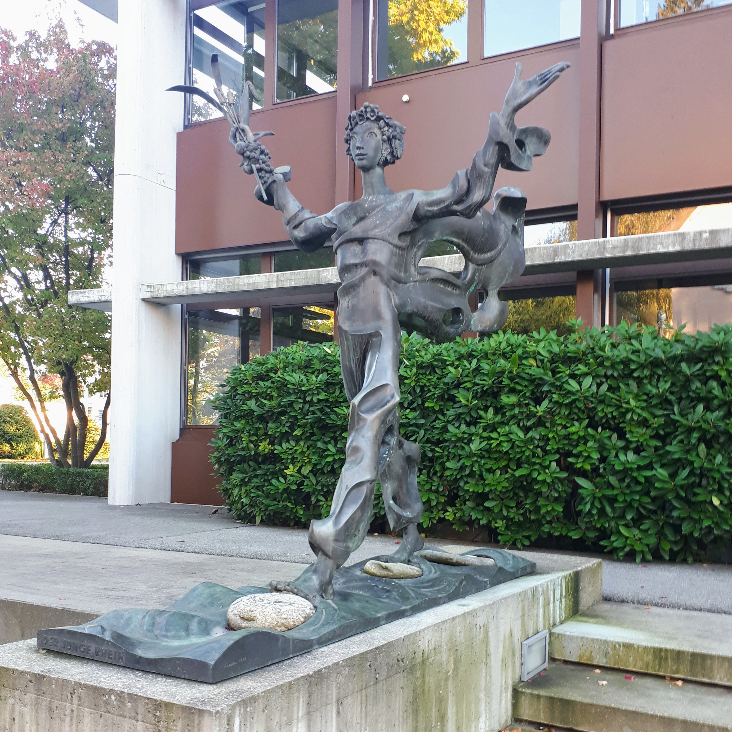 Bonze-Skulptur von Albert Wider